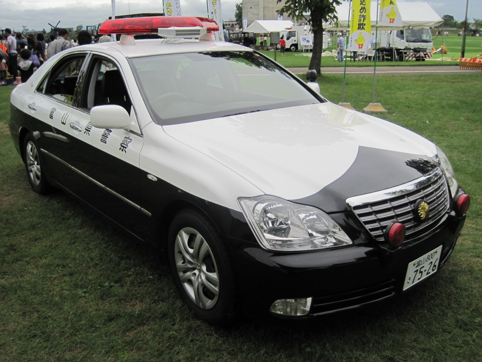 富山県警察小矢部警察署所属のトヨタ・クラウン（S180系）